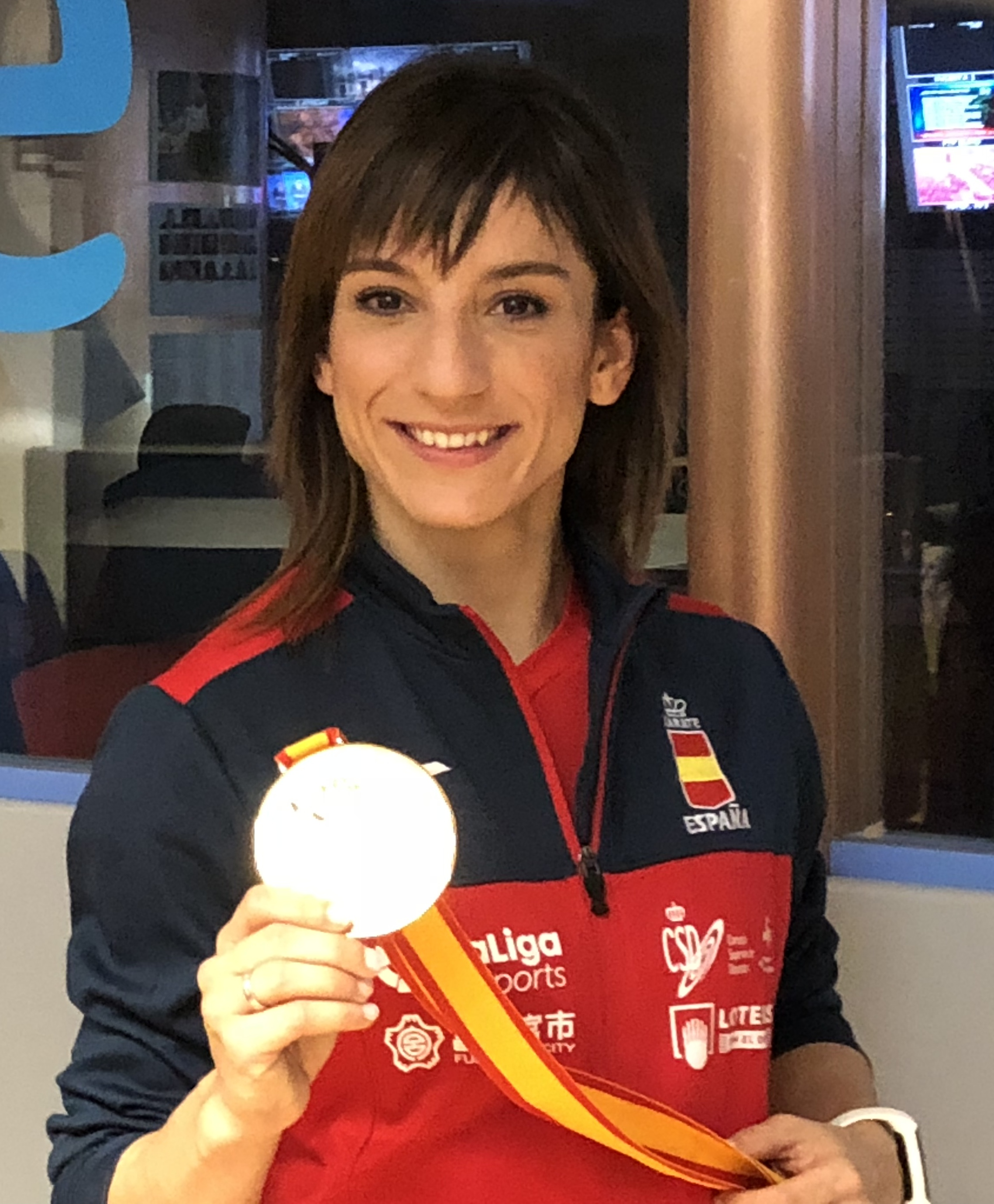 Medalla de campeona del mundo